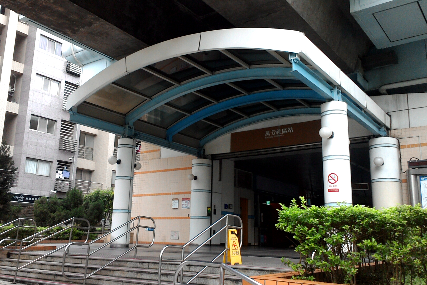 捷運萬芳社區站出口,台北市文山區萬芳次分區萬美里